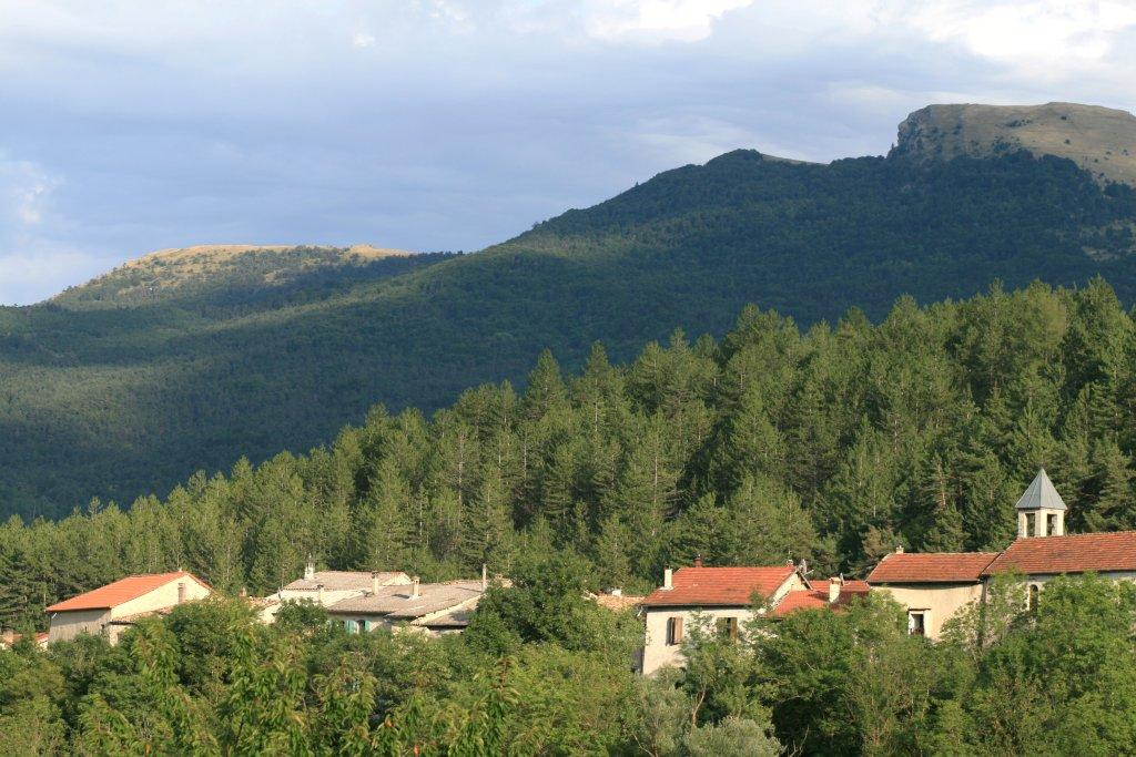 village de Valdrôme avec le clocher du temple et le sommet de la Tête du Lion